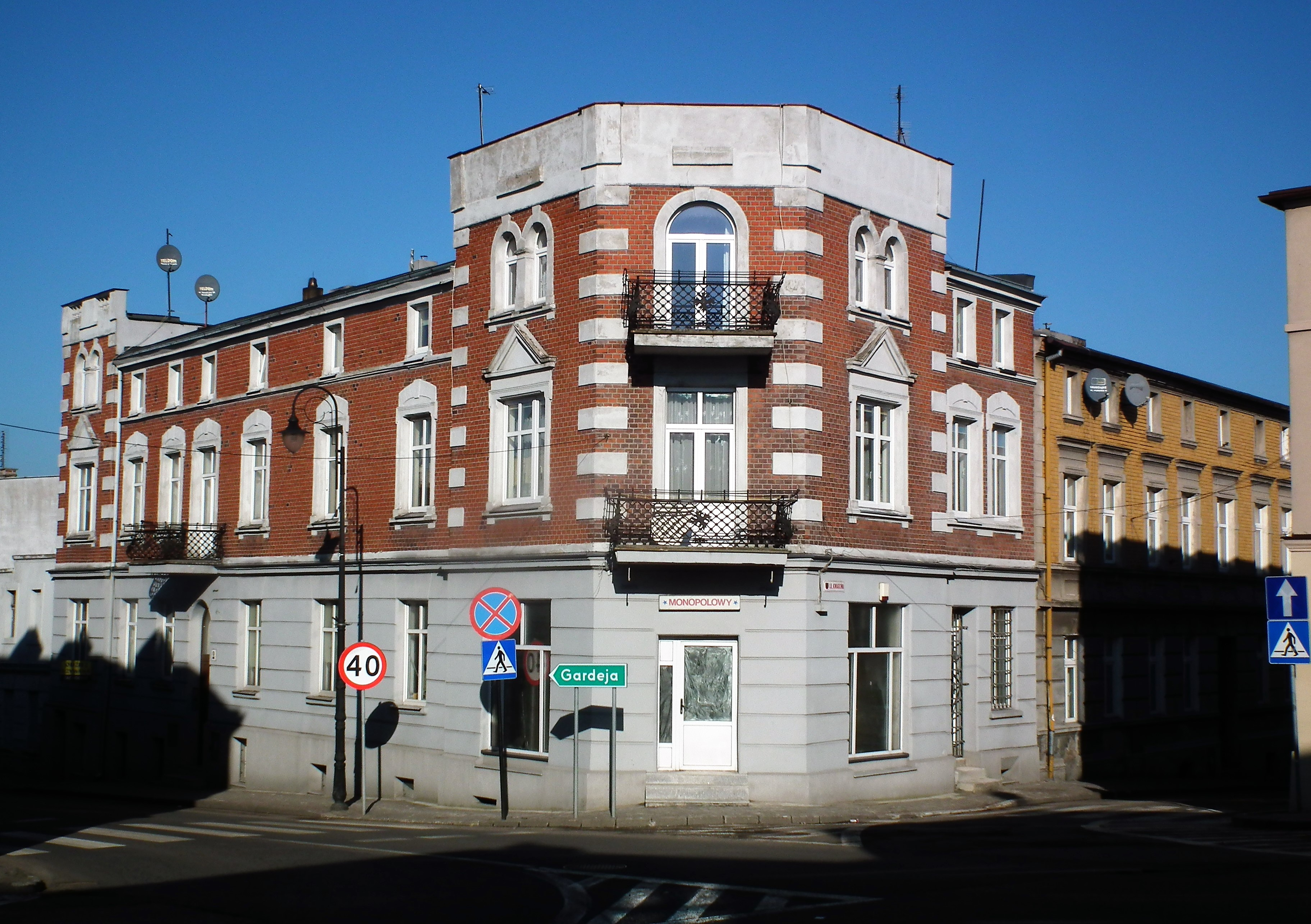 Widok miejski z Łasina.